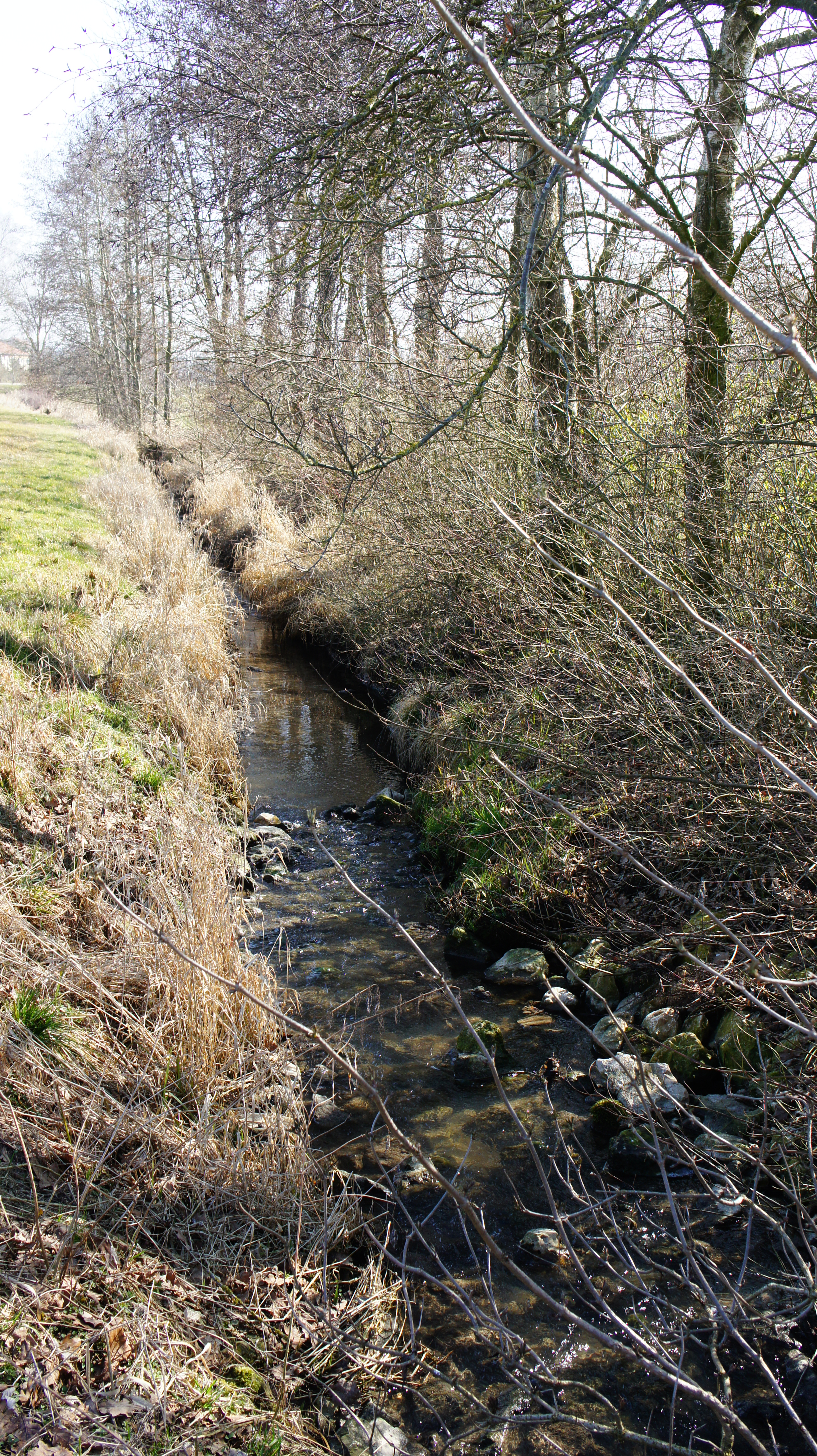 Ampfrach